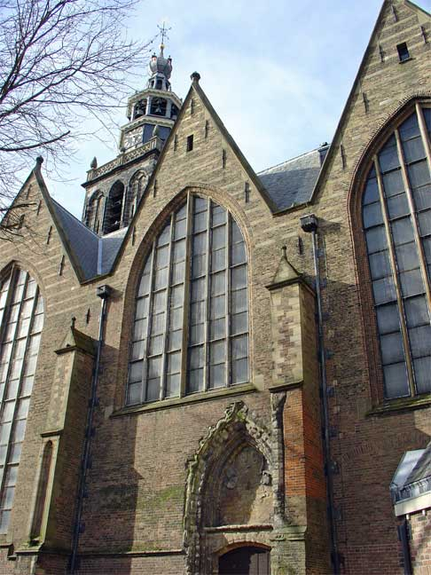 Gouda, Grote- of Sint-Janskerk